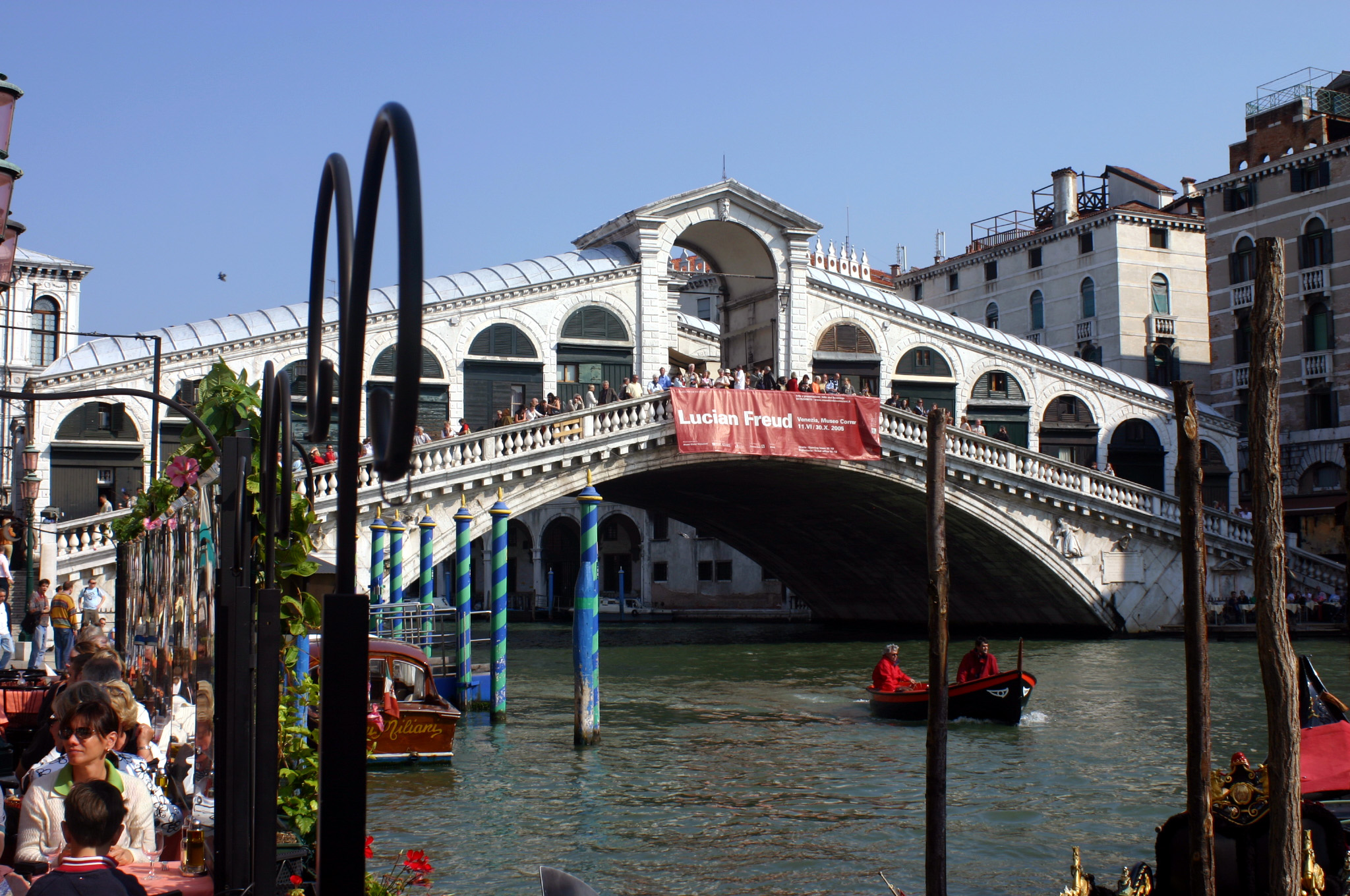 Venezia, Ponte di Rialto